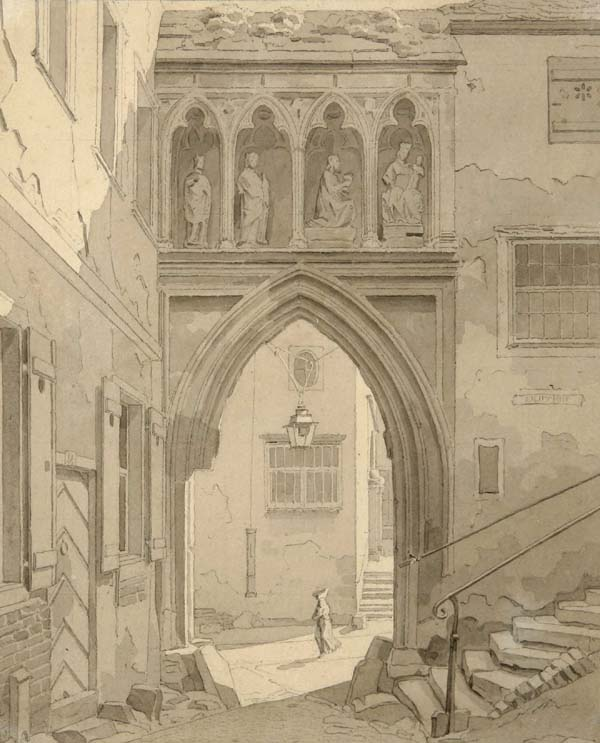 Dreikönigenpförtchen. Zeichnung aus 1827, braun lavierte Tuschzeichnung für „Sammlung von Ansichten oeffentlicher Plätze, merkwürdiger Gebäude und Denkmäler in Köln“, von Johann Peter Weyer herausgegeben (von Anton Wünsch lithographiert) unsigniert, montiert, 25.5x21.5 cm